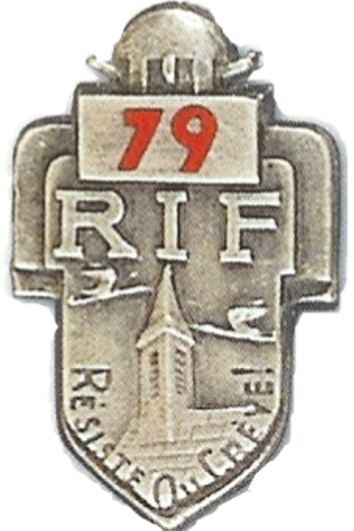 insigne du 79 régiment d'infanterie de forteresse.